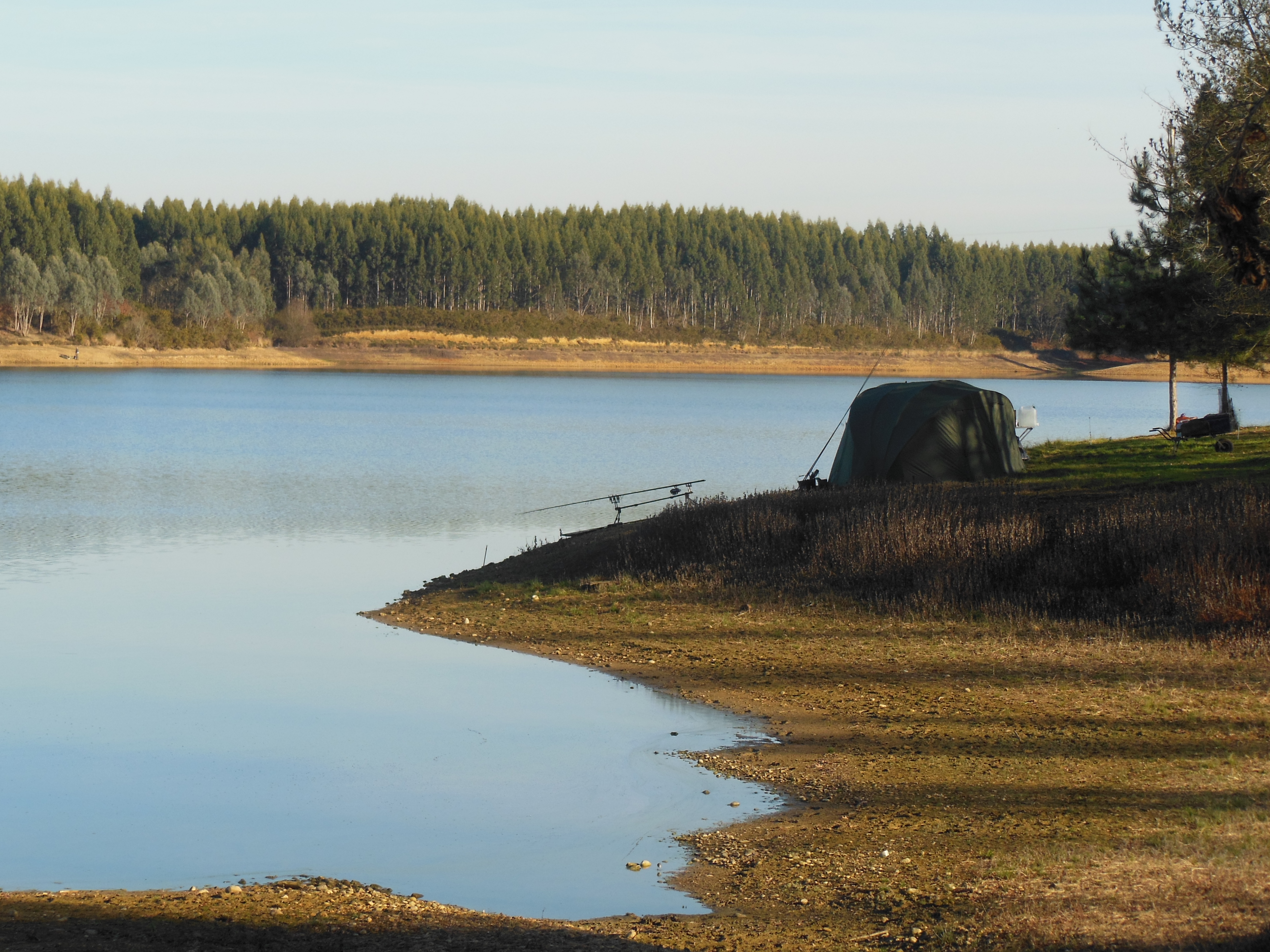 Lac d'Agès vu d'Hagetmau, dans le département français des Landes.